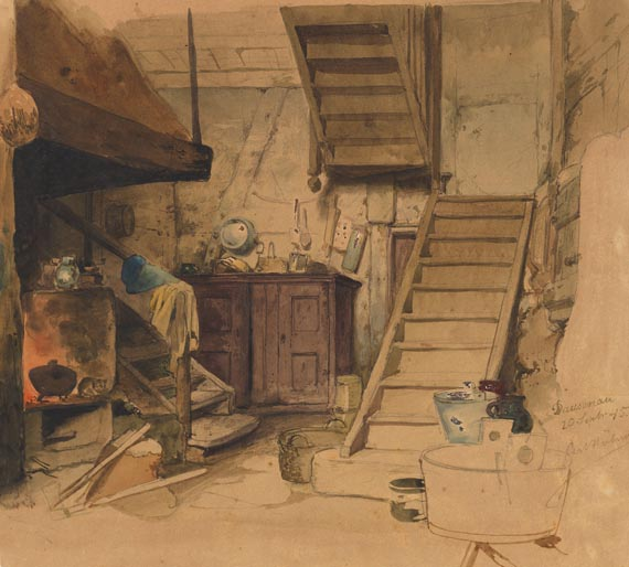 Interieur in Dausenau. Aquarell über Bleistift. Rechts unten signiert, datiert "20 Sept 45" und bezeichnet "Dausenau". 28,4 x 31,5 cm